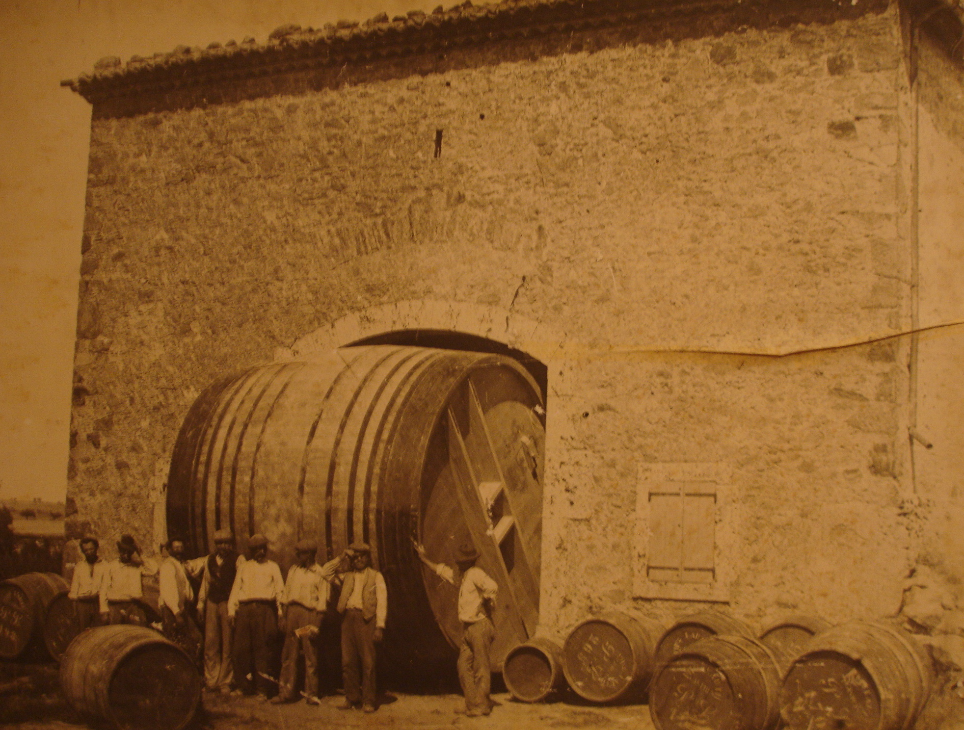 Foudre en bois du département de l'Aude. Photo prise à l'exposition de l'abbaye de Caunes-Minervois